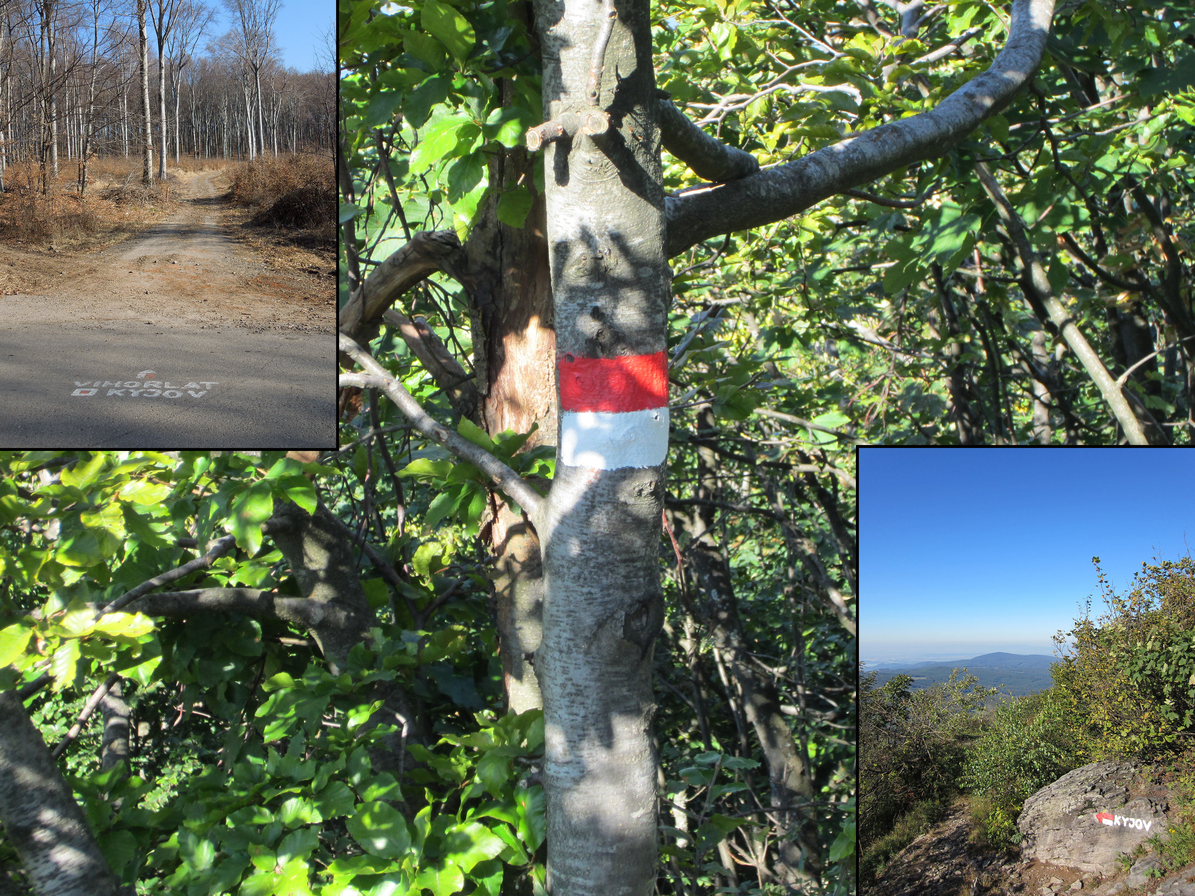 Podoba neoficiálnej červenej značky pozostávajúca z červeného a bieleho pásu, namaľovaného na kmeni stromu